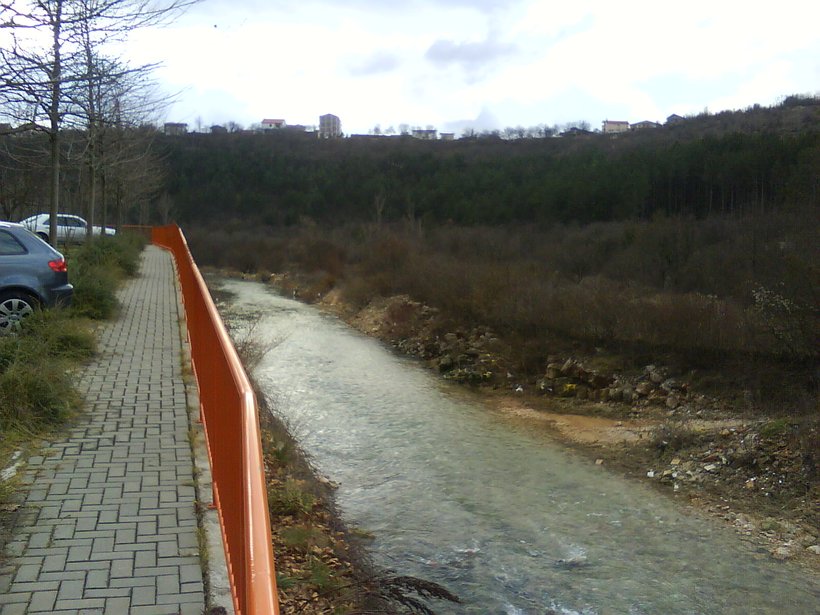 Ugrovača river in Široki Brijeg